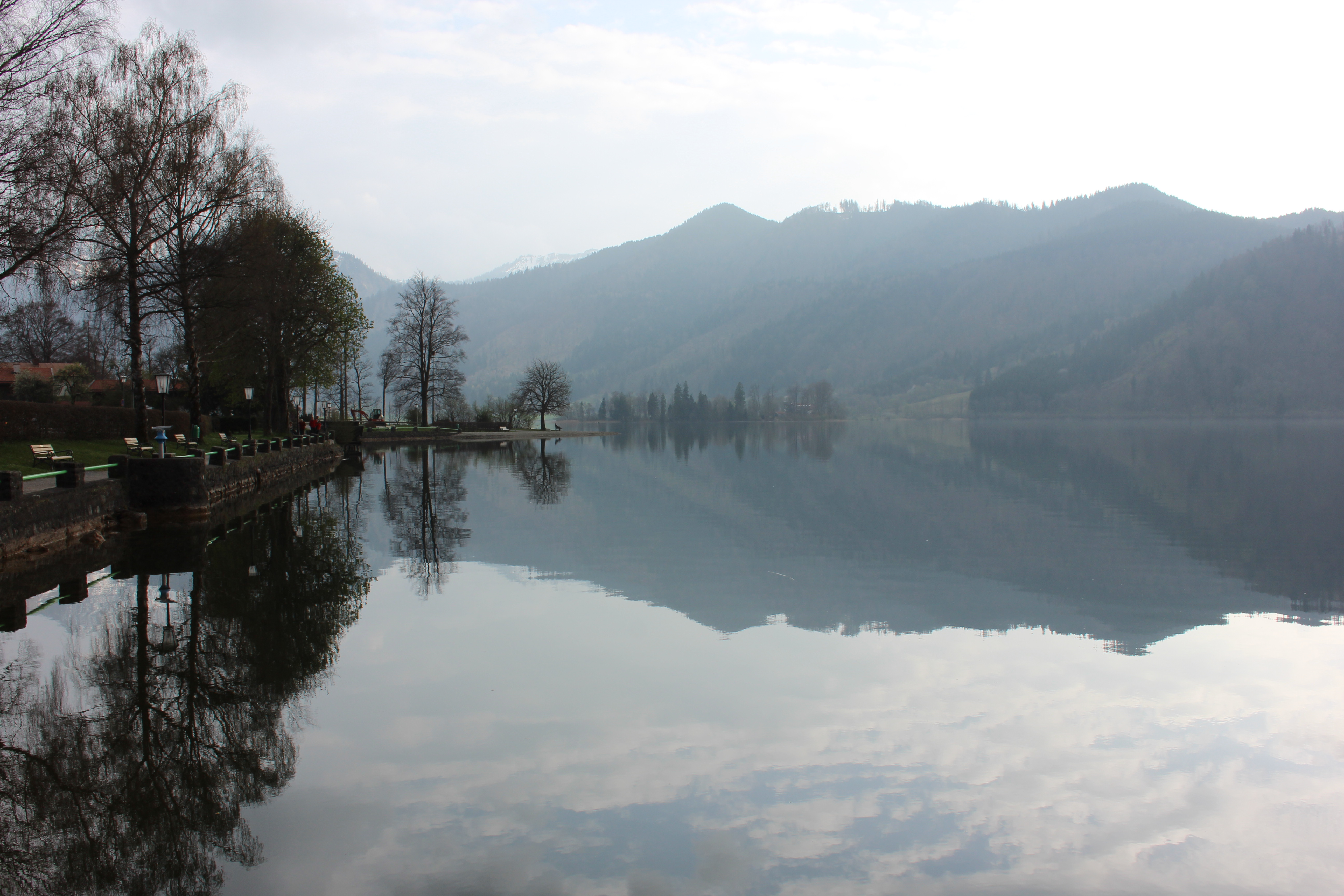 Schliersee